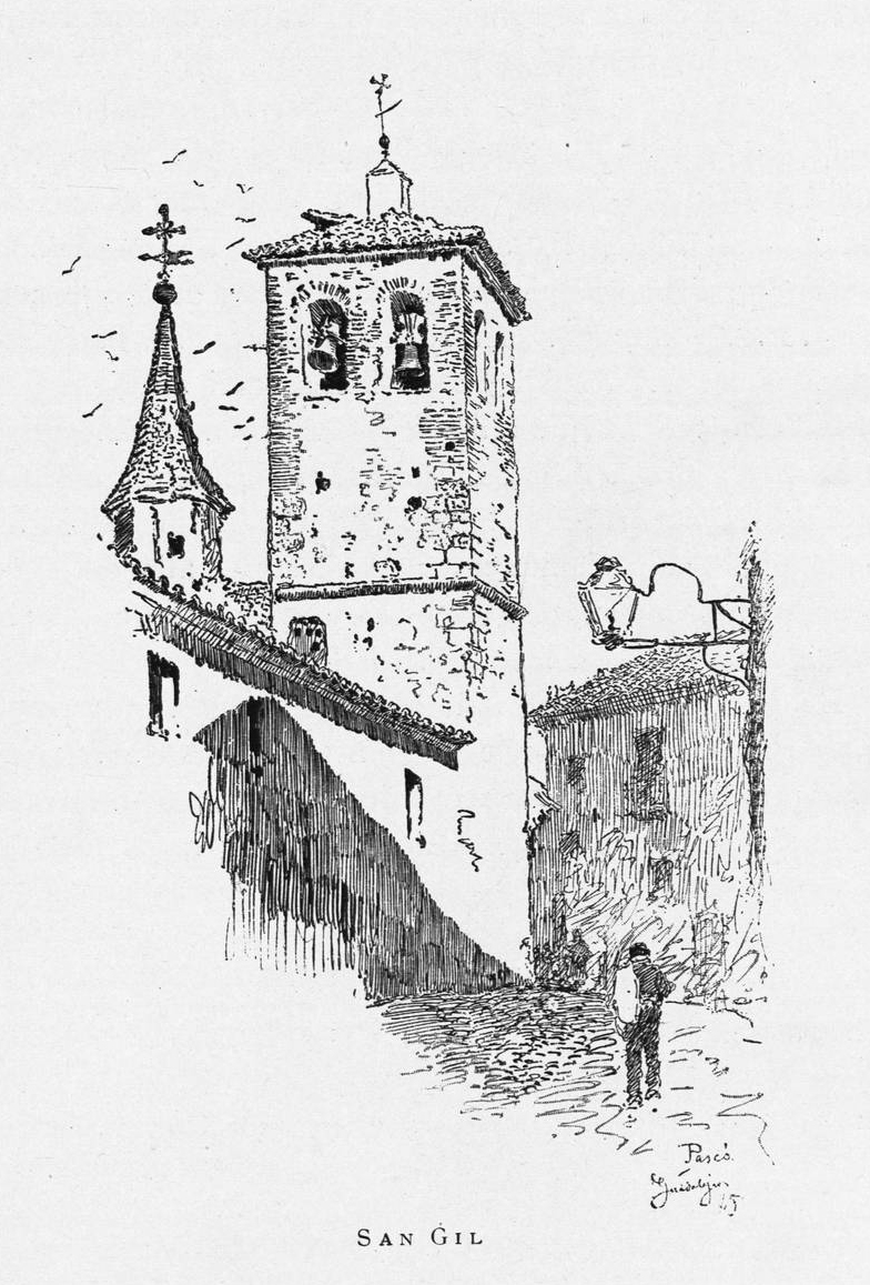 Iglesia de San Gil, en Guadalajara.